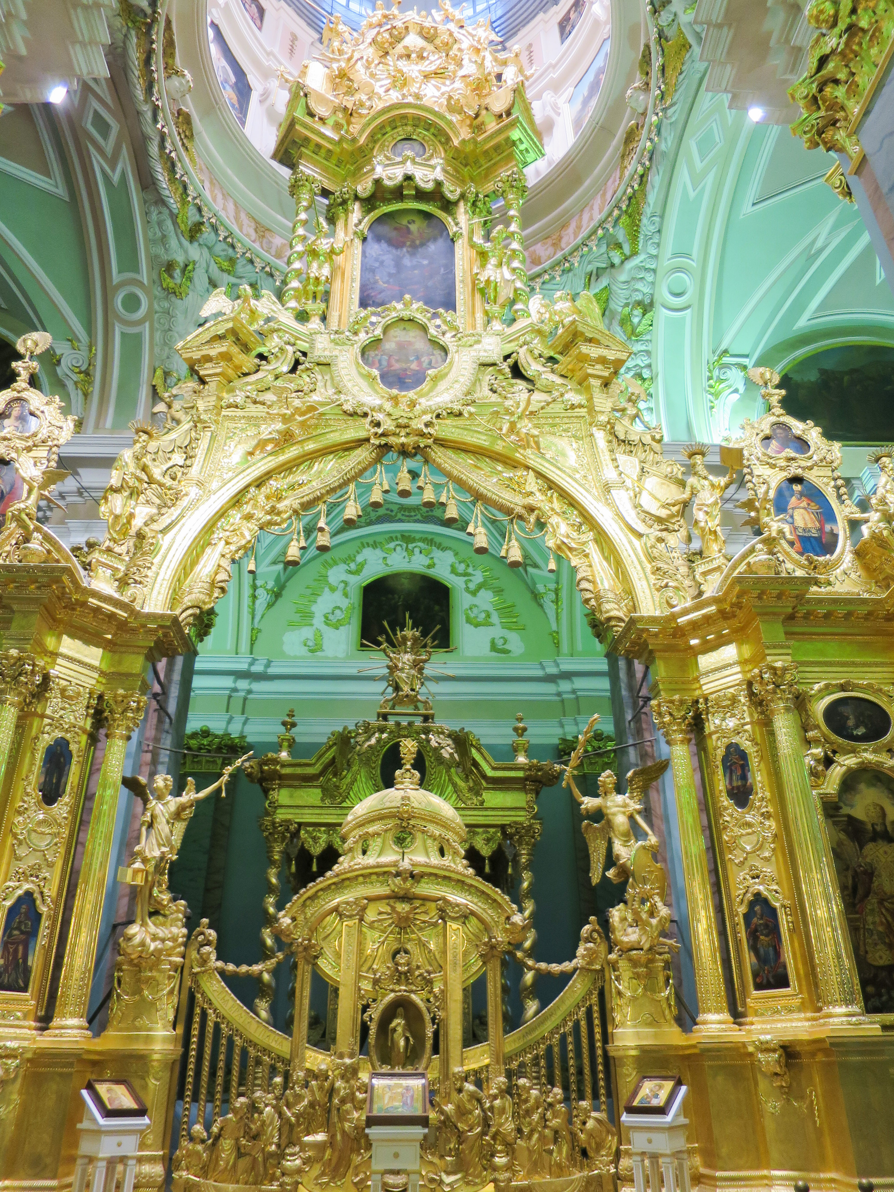 Iconostase de la cathédrale Saints-Pierre-et-Paul, dans la forteresse Pierre-et-Paul à Saint-Pétersbourg (Saint-Pétersbourg / Russie)